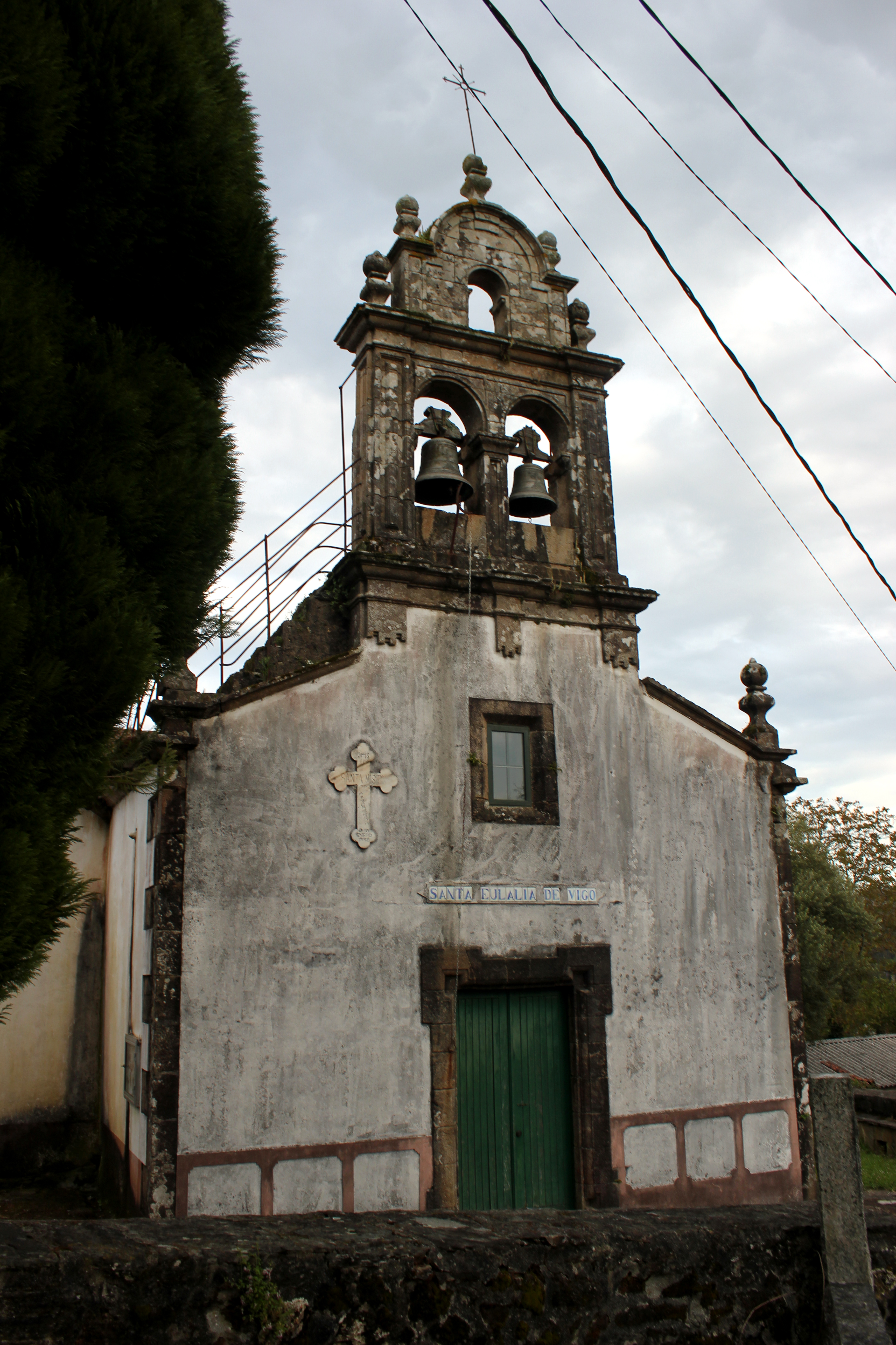 Igrexa de Vigo, Boqueixón.